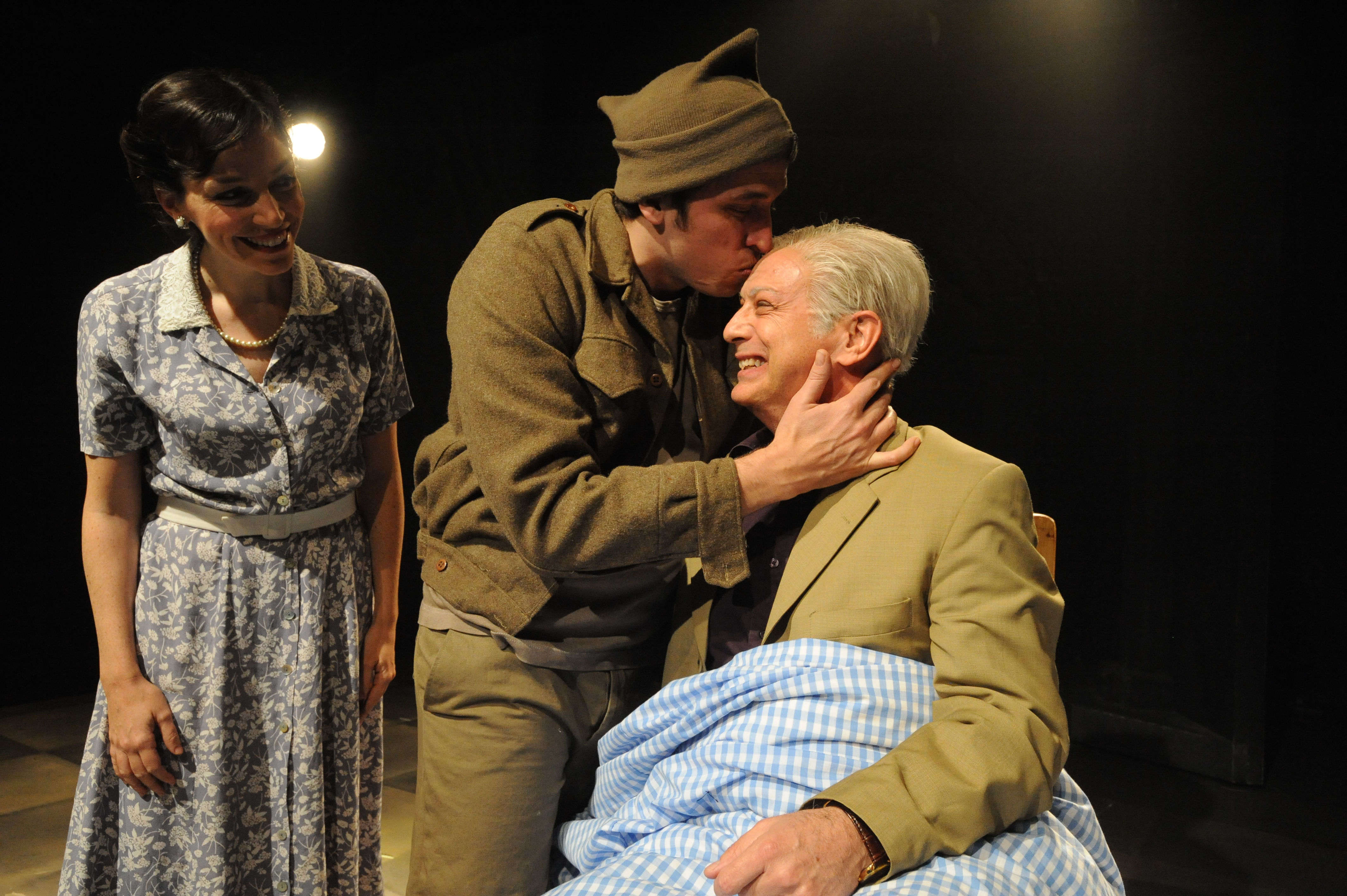 ארז שפריר, יואב היימן ושרון שטרק בהצגה "אהובת הדרקון", מאת ובבימויו של מיקי גורביץ', תיאטרון החאן